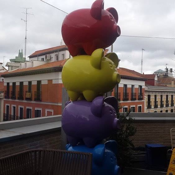 Cuatro cerditos en distintos colores del artista dEMO en el Mercado de San Antón, Chueca, Madrid.